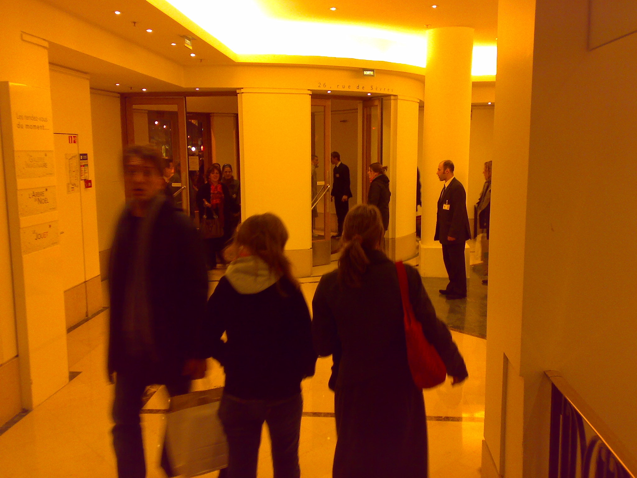 Intérieur du Bon Marché à Paris